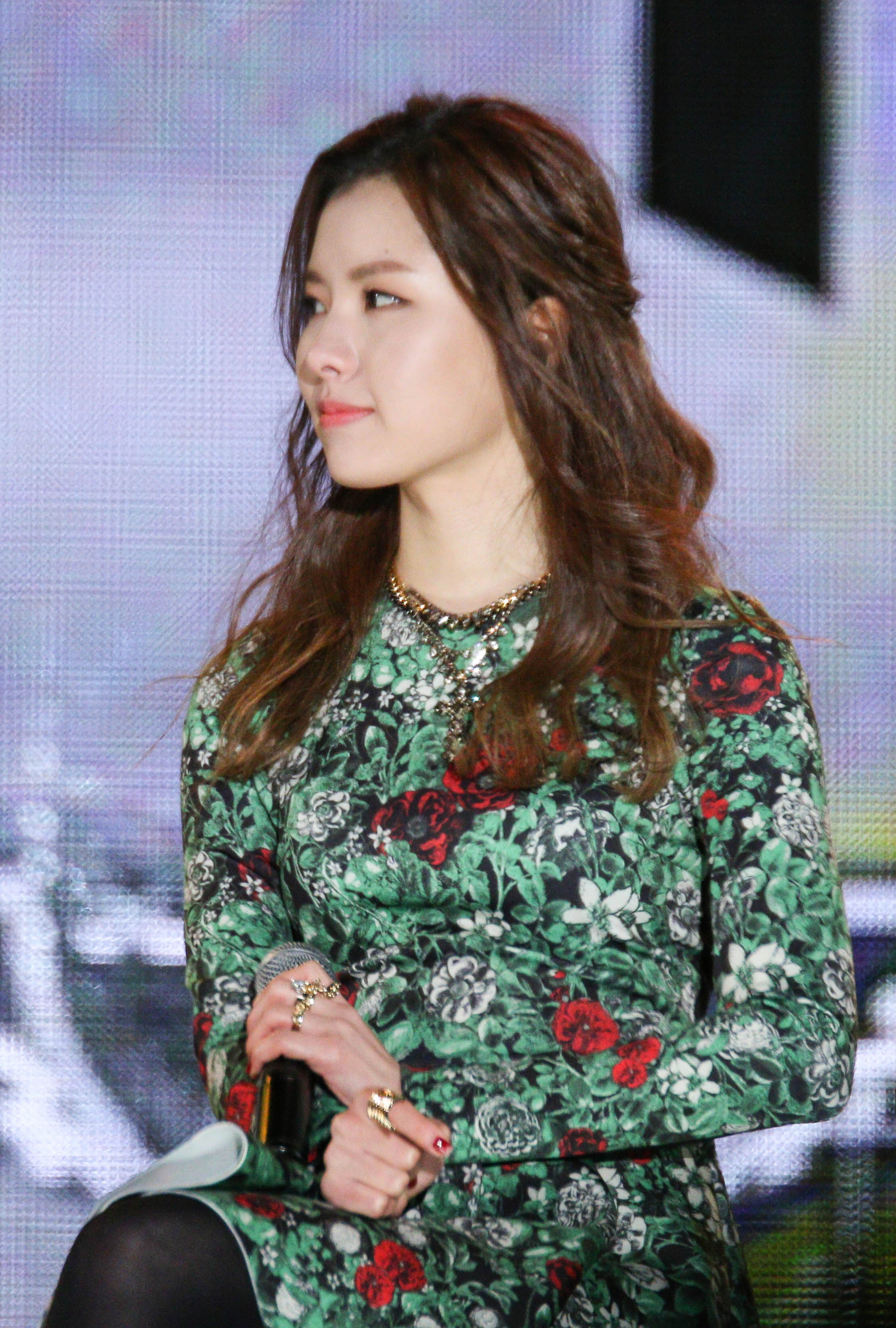 141211 김예림&에디킴 더쇼 in 코엑스 야외무대